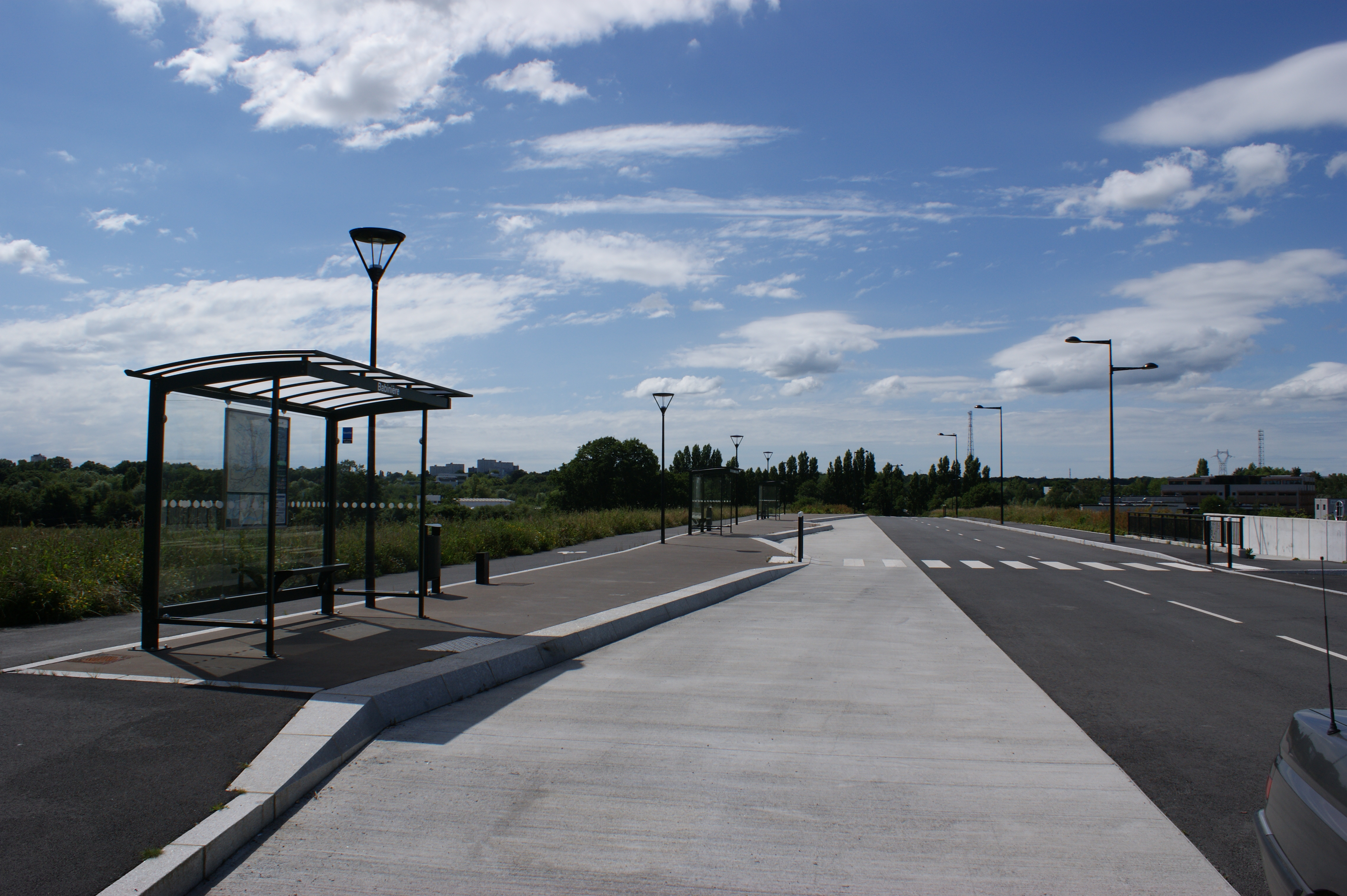 Gare de Babinière, la gare routière pour le stationnement des cars.